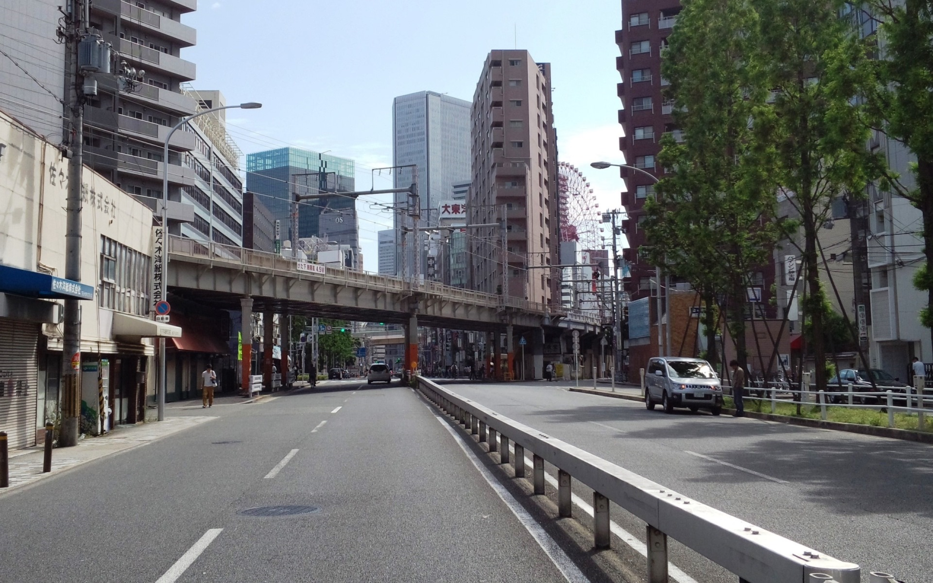 都島通・中崎東付近